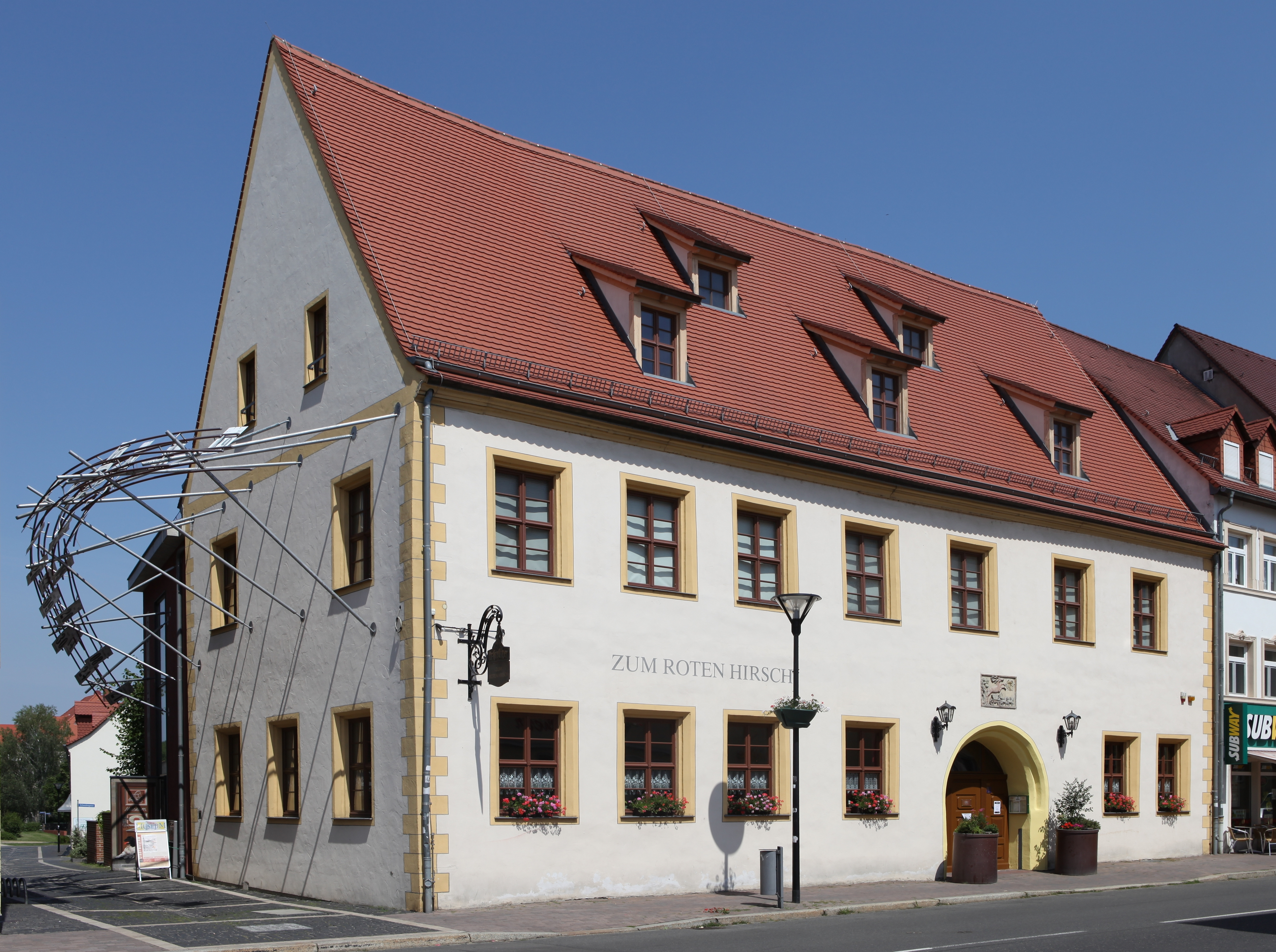 Kulturdenkmal Gasthof Torgauer Straße 40 in Eilenburg; Objektnummer: 08973291